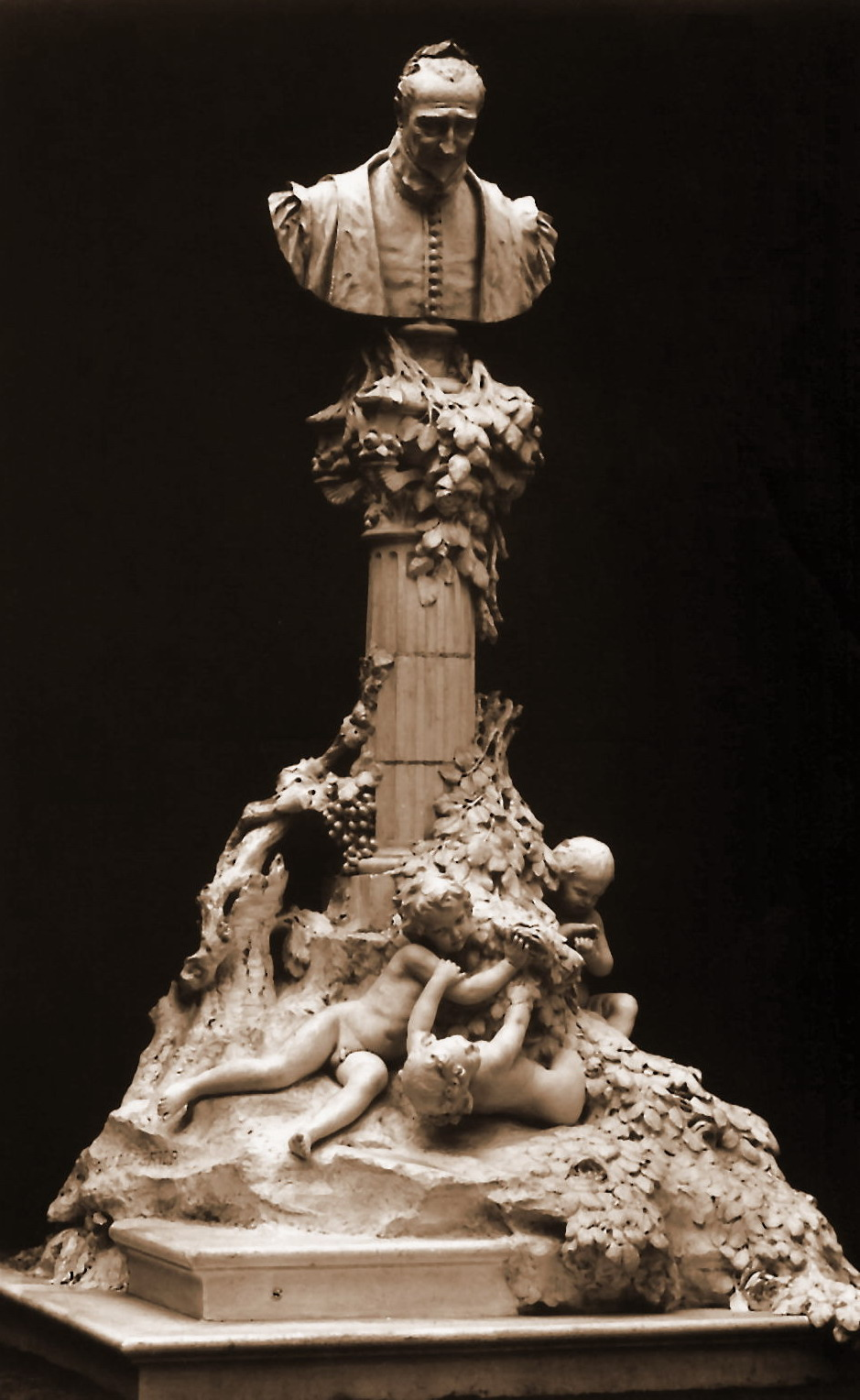 Ronsard par Georges Delpérier